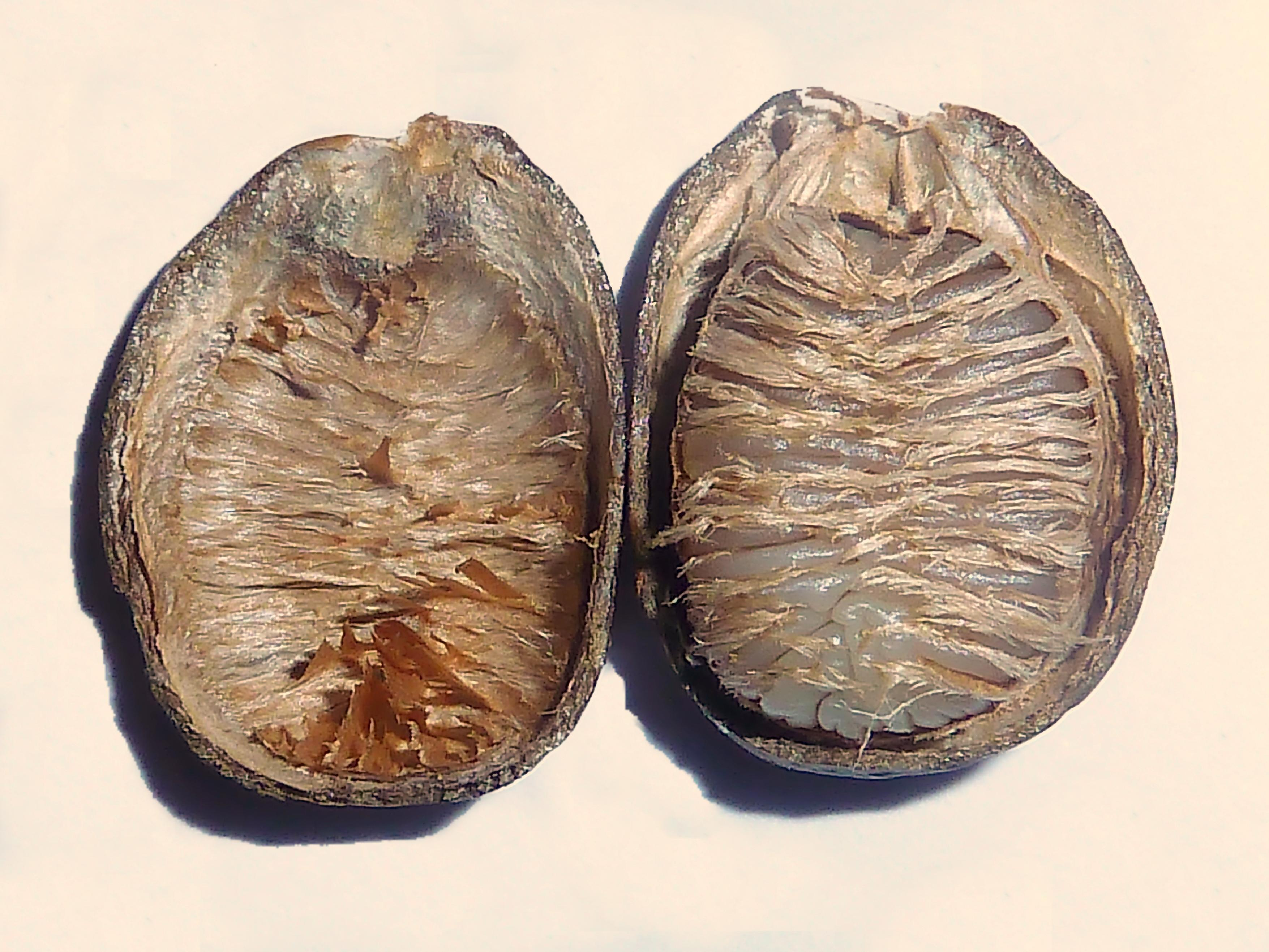 Annona cherimola (Chirimoya) : Semilla abierta, evidenciando el endocarpo coriáceo, el tegumento fibroso insinuandose en las ruminaciones laminiformes del endosperma, el hilo y el micrópilo.